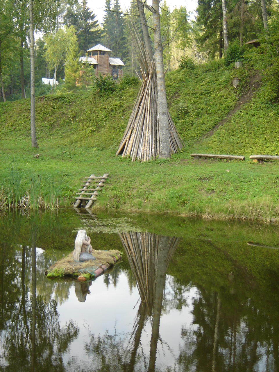 Sulglohk ehk söll Kassinurme linnamäe ees